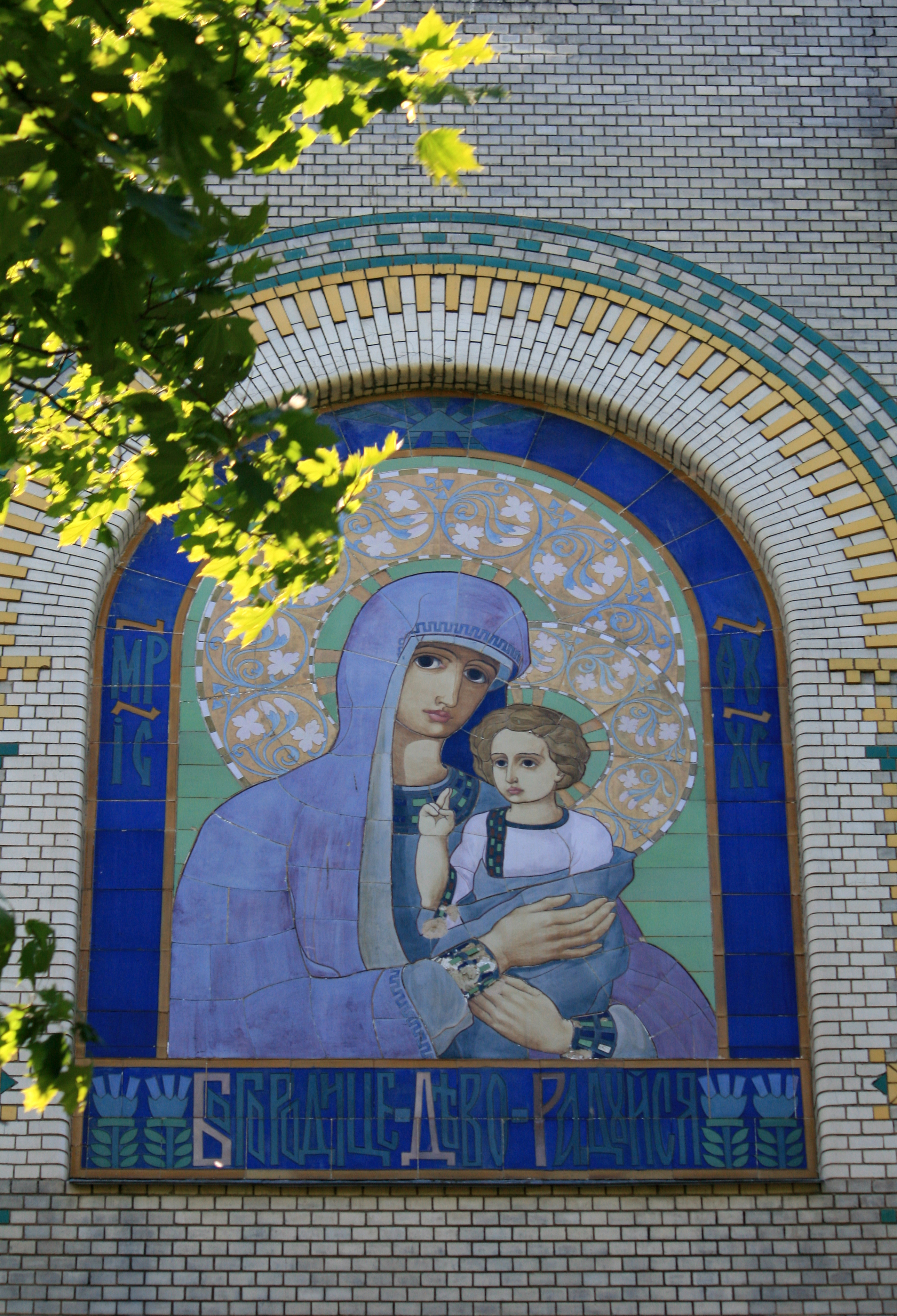 Санкт-Петербург, Александровский парк, 5, главное здание ортопедического института с майоликовой иконой богоматери